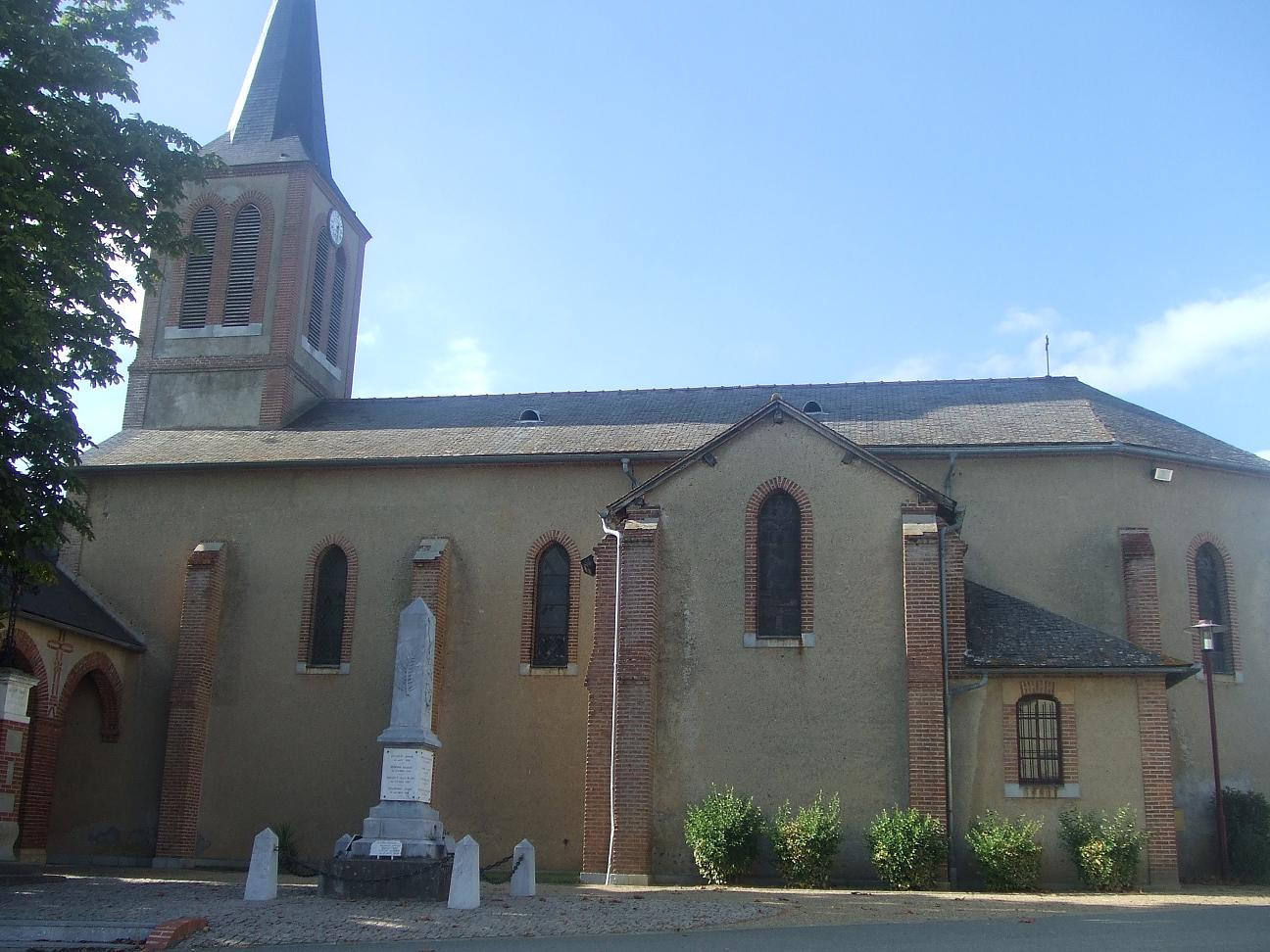 Eglise de Lamayou, Pyrénées-Atlantiques, France